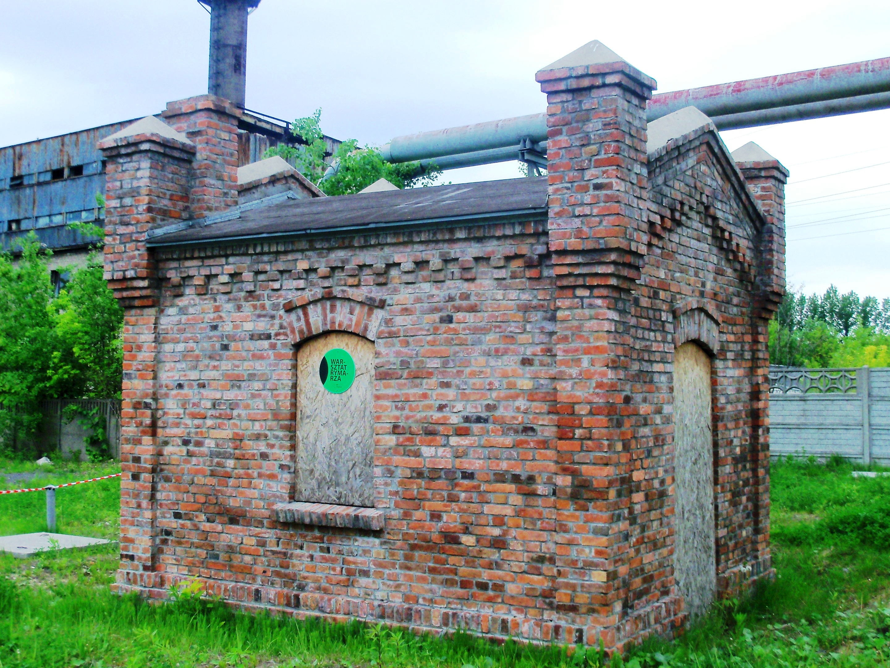 Tereny dawnej kopalni Katowice. Warsztat rymarza. Zdjęcie wykonane podczas Nocy Muzeów 2011